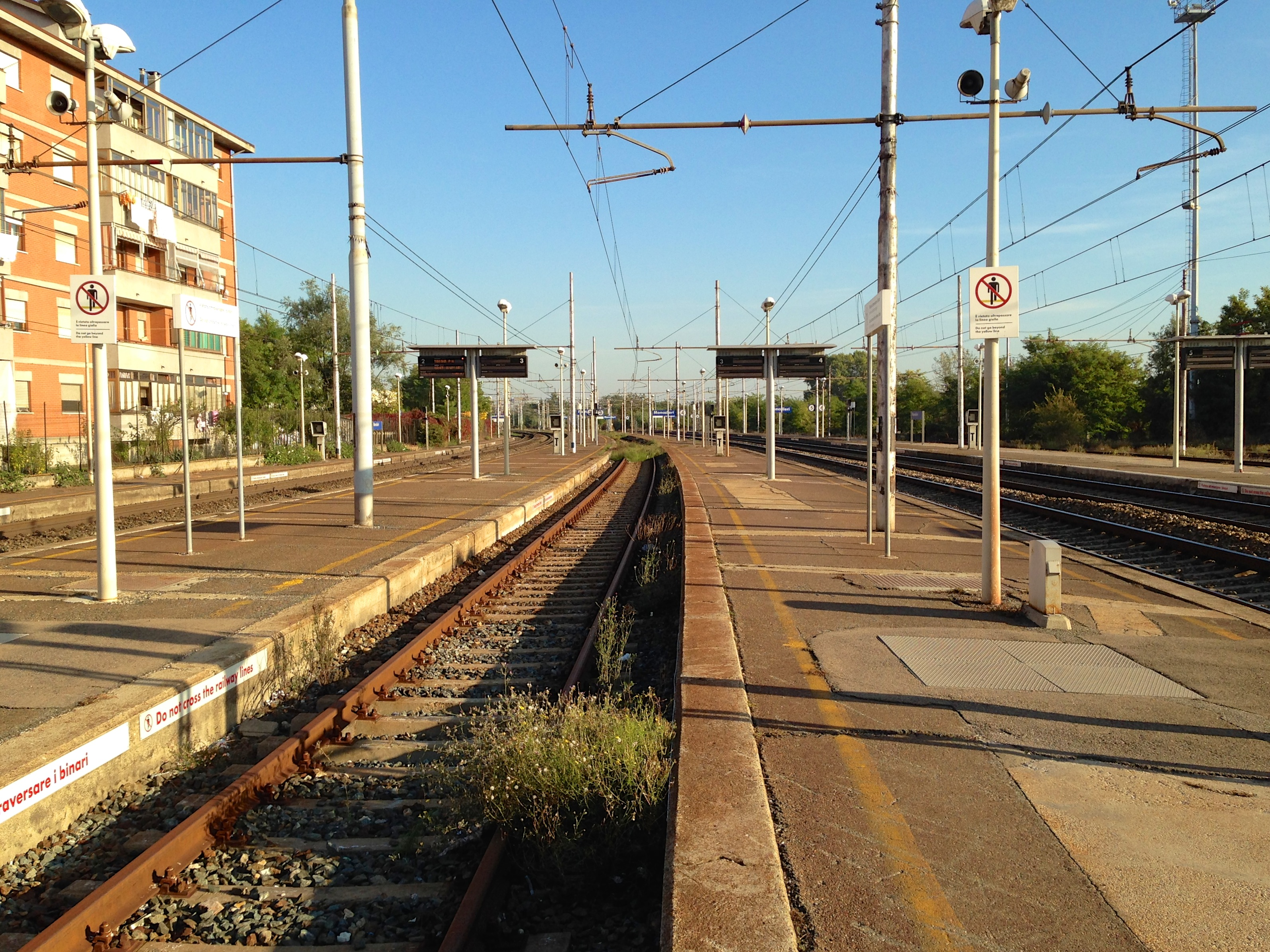 Stazione di Moncalieri